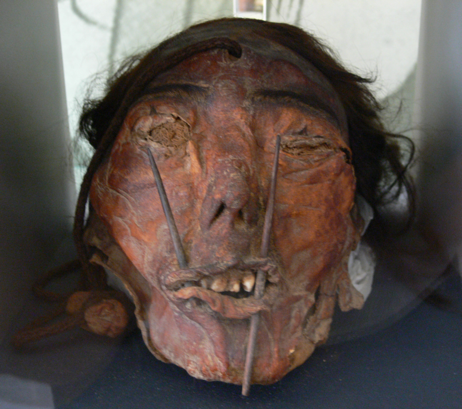 Schaffhausen, Museum zu Allerheiligen, Sammlung Ebnöther, (Abteilung "Krieger/Waffen") Trophäenkopf (menschlicher Kopf), Peru, südliche Küstenregion, Nazca, 100 v. – 700 n. Chr.